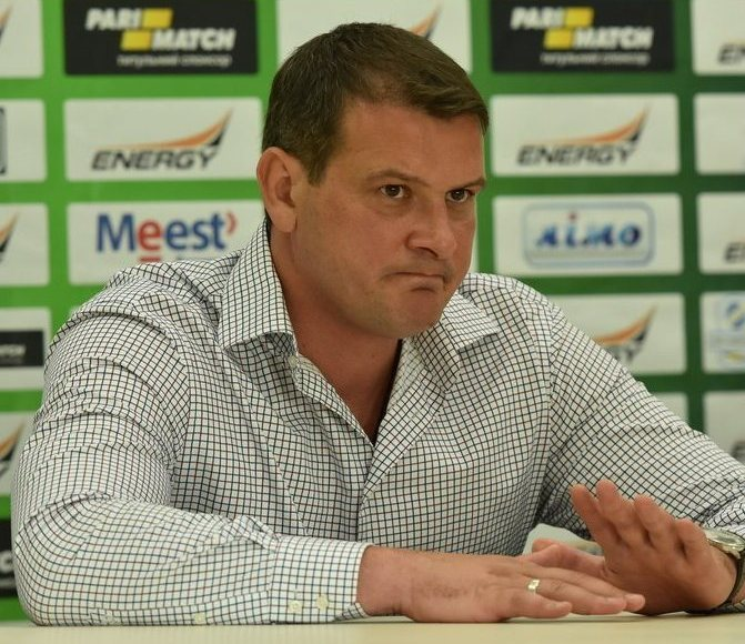 Сергій Зайцев - тренер Карпат